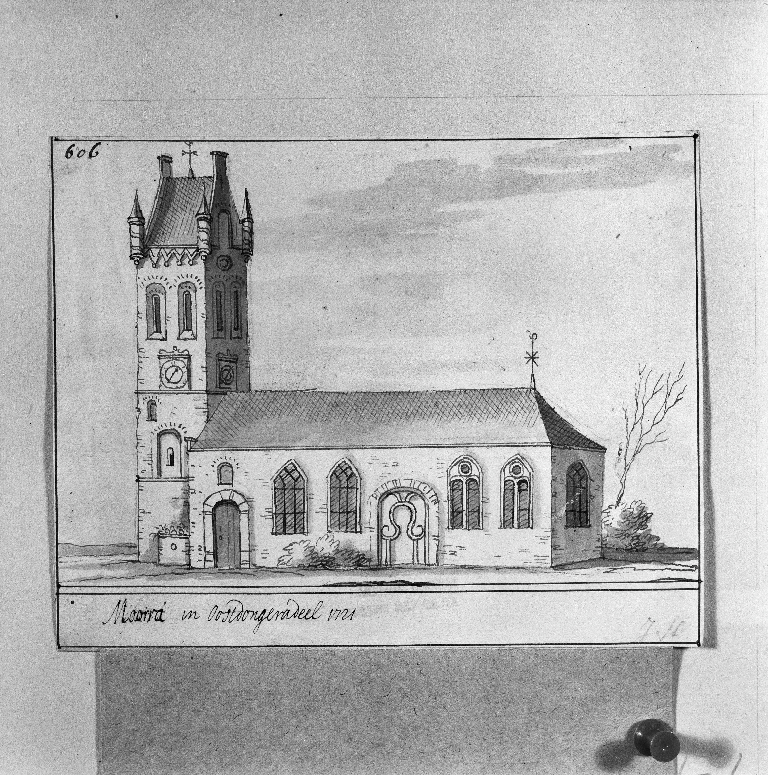 Nederlands Hervormde Kerk: kerk 1721, tekening Stellingwerf, Collectie Fries Museum